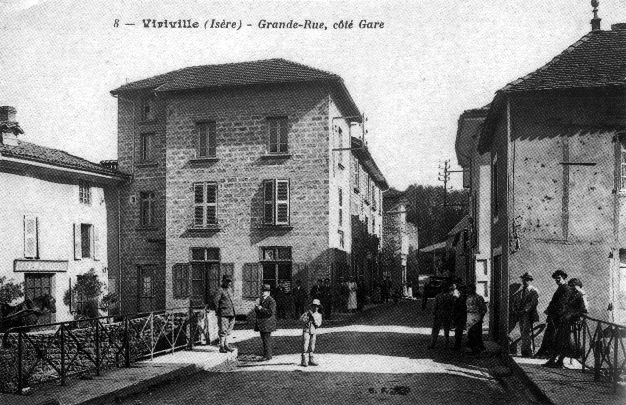 Viriville, Grande-Rue, coté gare, en 1907